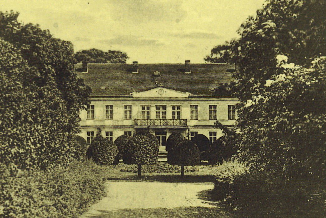 Gutshaus Krenzow im Jahre 1925, 17390 Rubkow-Krenzow